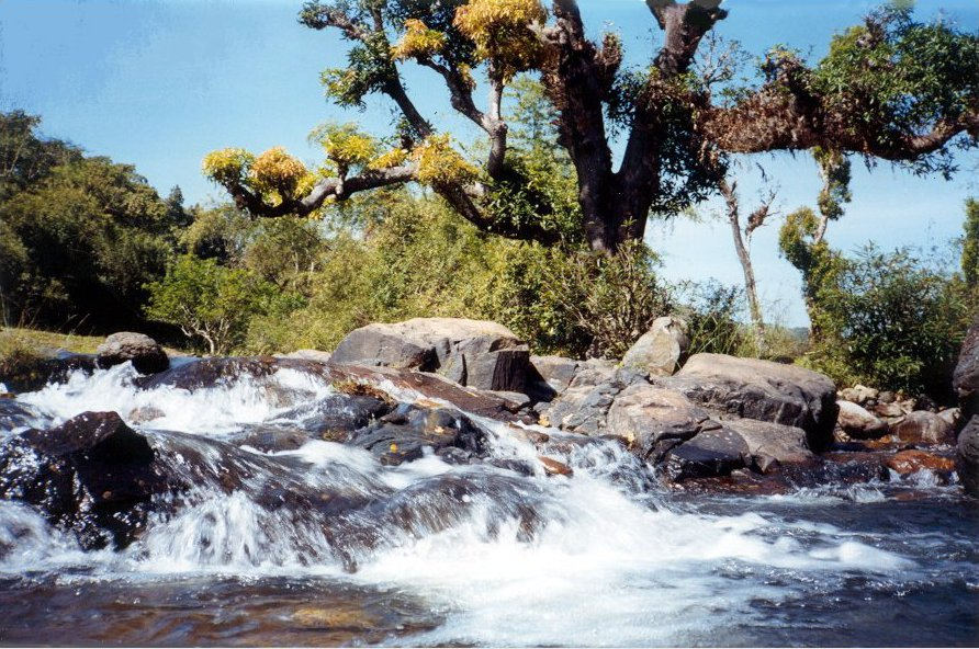 തിരുനെല്ലിയിലെ പാപനാശിനി എന്ന കാട്ടുചോല